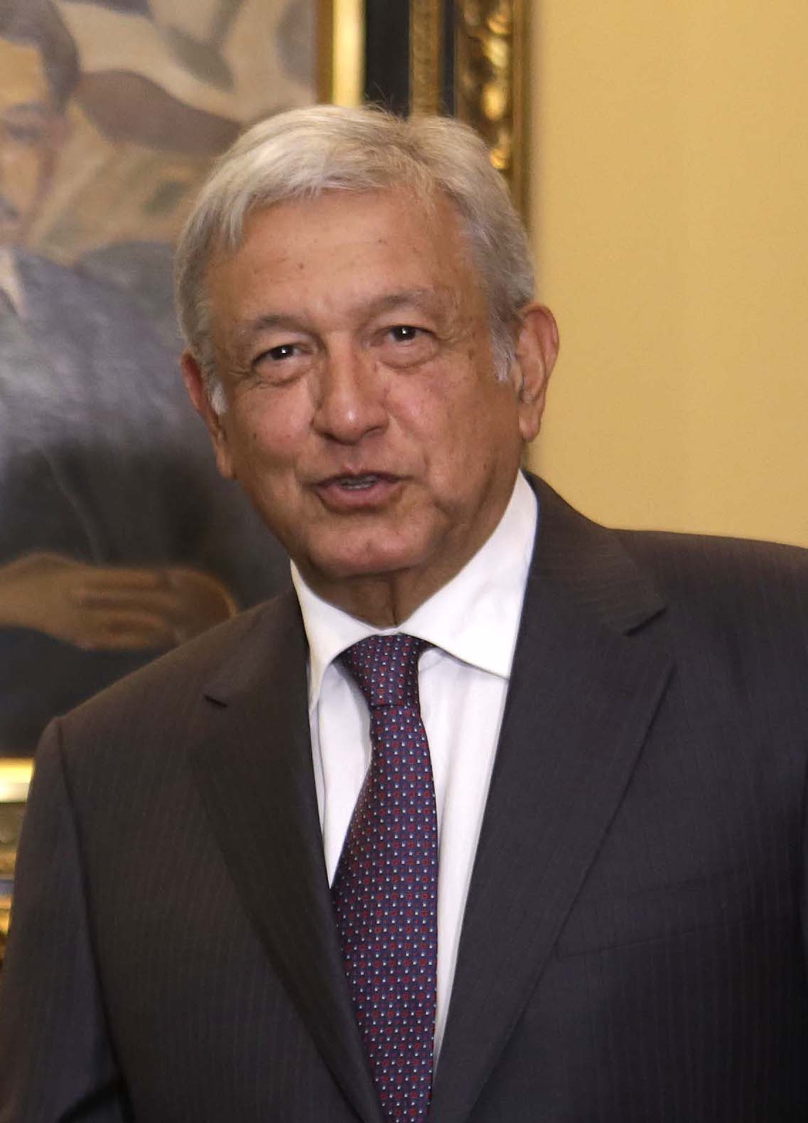 Andrés Manuel López Obrador (agosto 2017)